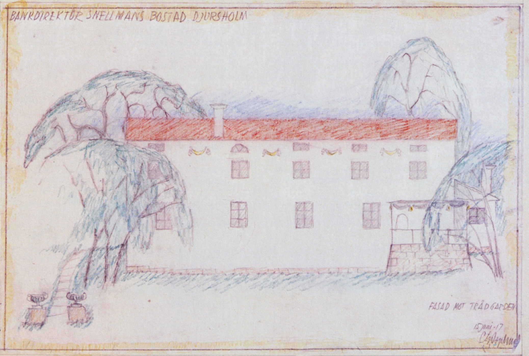 Gunnar Asplunds illustration för Villa Snellman i Danderyd